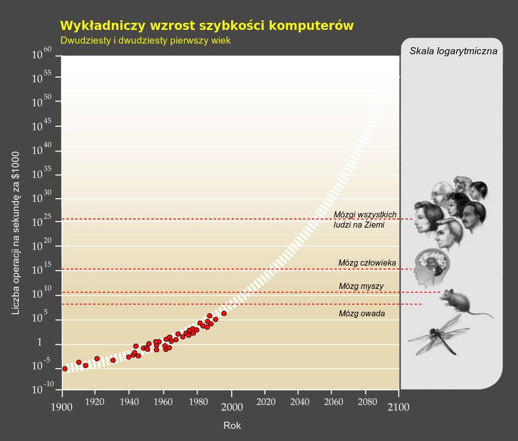 Wykładniczy wzrost szybkości komputerów. XX i XXI wiek.